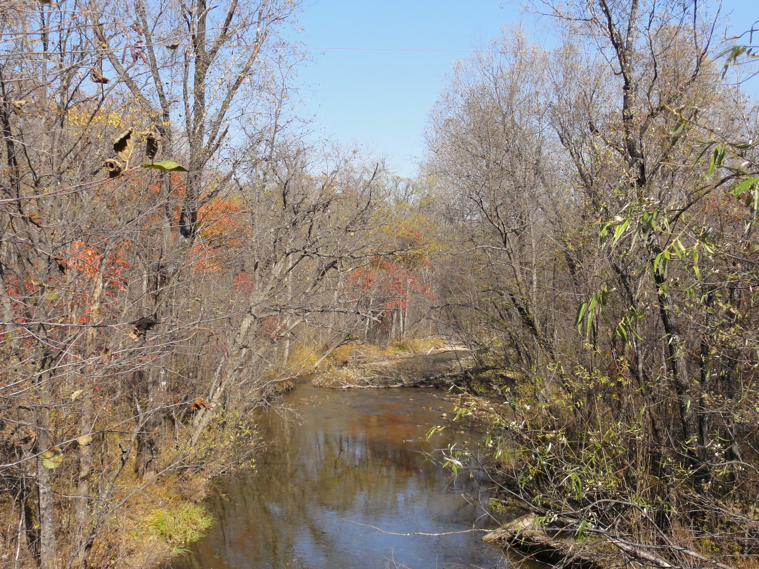 Река Нежданка с моста на дороге на склады ВВ